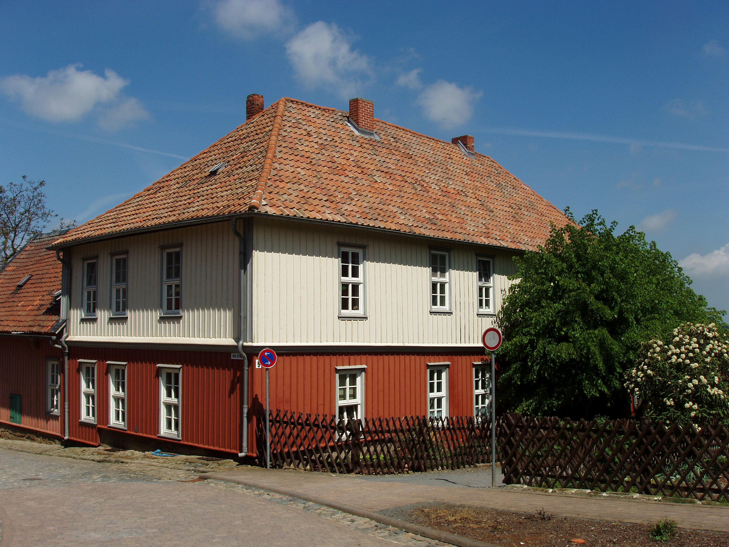 Börnecker Pfarrhaus